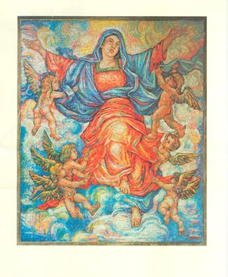 Carnate